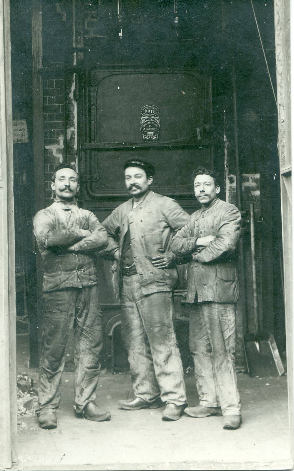 Carte-photo ancienne réalisée par Charrière, légendée à la main : Fonderie et atelier de La Courneuve 3 ouvriers posant devant une chaudière construite en 1903 par les Fonderies et Ateliers de La Courneuve (Plaque APAVE N°5211)